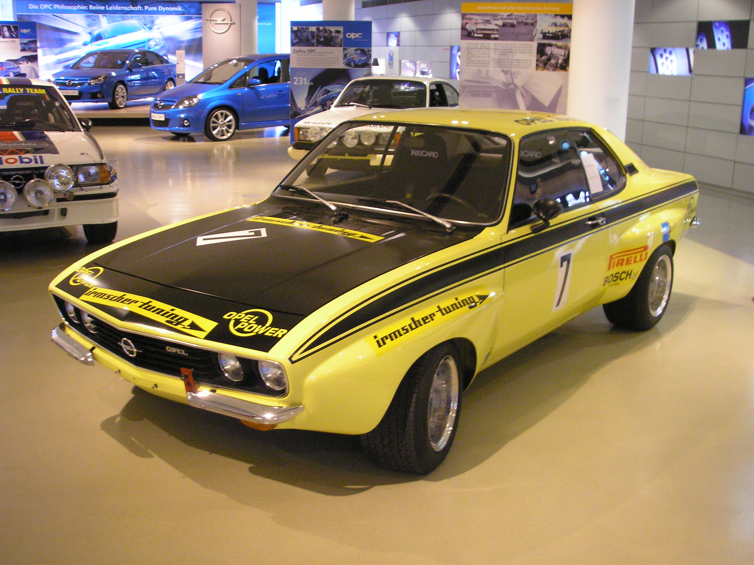 Description: Opel Manta A "Spa Francorchamps", im Opel Zentrum in Berlin an der Friedrichstraße. Baujahr 1974, 4 Zylinder, ca. 200 PS, bis zu 200 km/h je nach Übersetzung. Nahm am 26. und 27. Juli 1975 am "Spa Francorchamps" Rennen teil, gefahren von Walter Röhrl und Rauno Altonen. The Opel Manta A "Spa Francorchamps", in the Opel Zentrum in Berlin at Friedrichstraße. Model from 1974, used in the race in July 1975 by Walter Röhrl and Rauno Altonen. Source: self-made, I release it into the public domain. Gryffindor 17:28, 9 March 2006 (UTC)